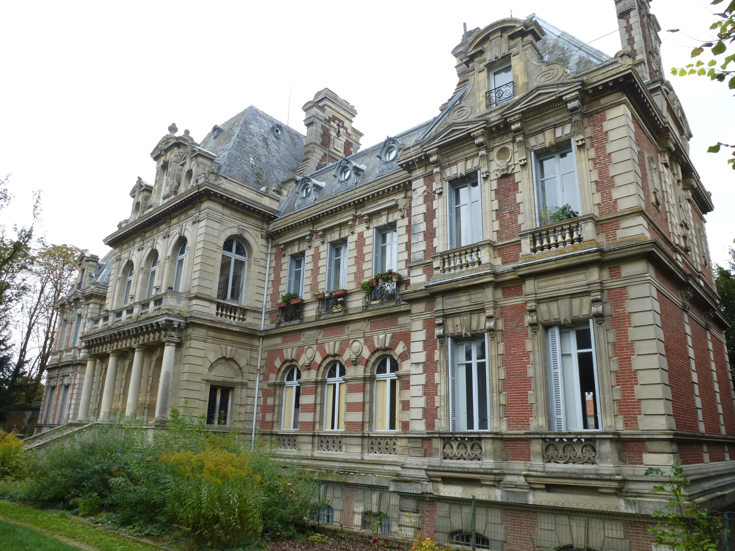 Château à Compans. (département de la Seine-et-Marne, région Île-de-France).